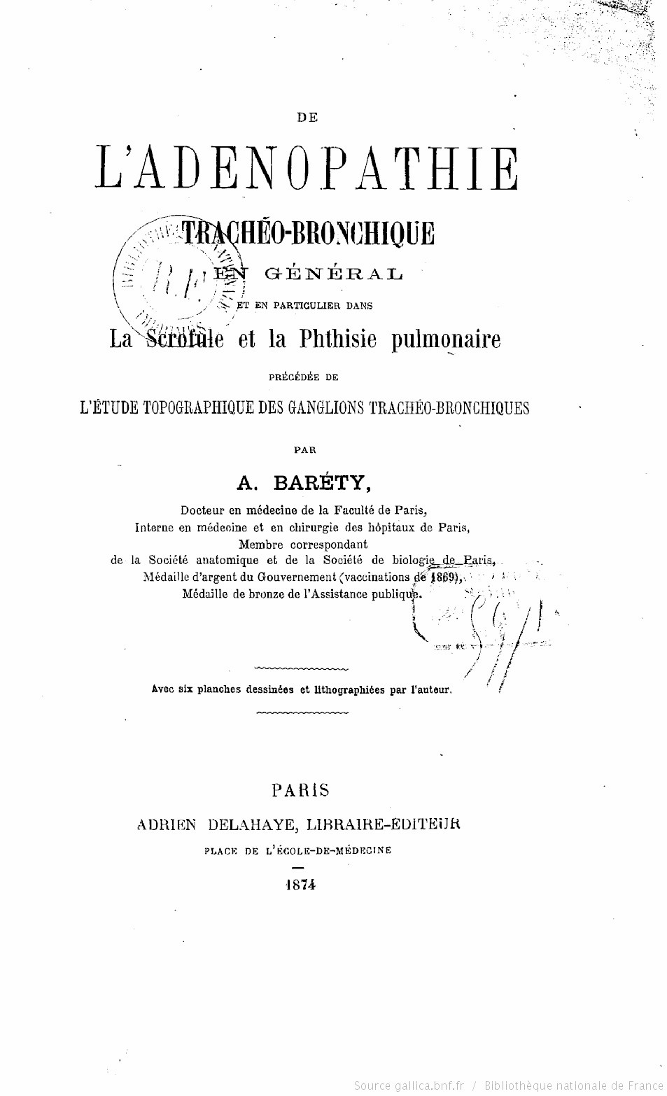 Titre : De l'Adénopathie trachéo-bronchique en général et en particulier dans la scrofule et la phtisie pulmonaire, précédée de l'étude topographique des ganglions trachéo-bronchiques, par A. Baréty,... Auteur : Baréty, Alexandre (1844-1918) Éditeur : A. Delahaye (Paris) Date d'édition : 1874 Type : monographie imprimée Langue : Français Format : In-8° , 318 p. et pl. Format : application/pdf Droits : domaine public Identifiant : ark:/12148/bpt6k5484941f Source : Bibliothèque nationale de France, département Sciences et techniques, 8-TD95-79 Relation : Provenance : bnf.fr Date de mise en ligne : 10/02/2009